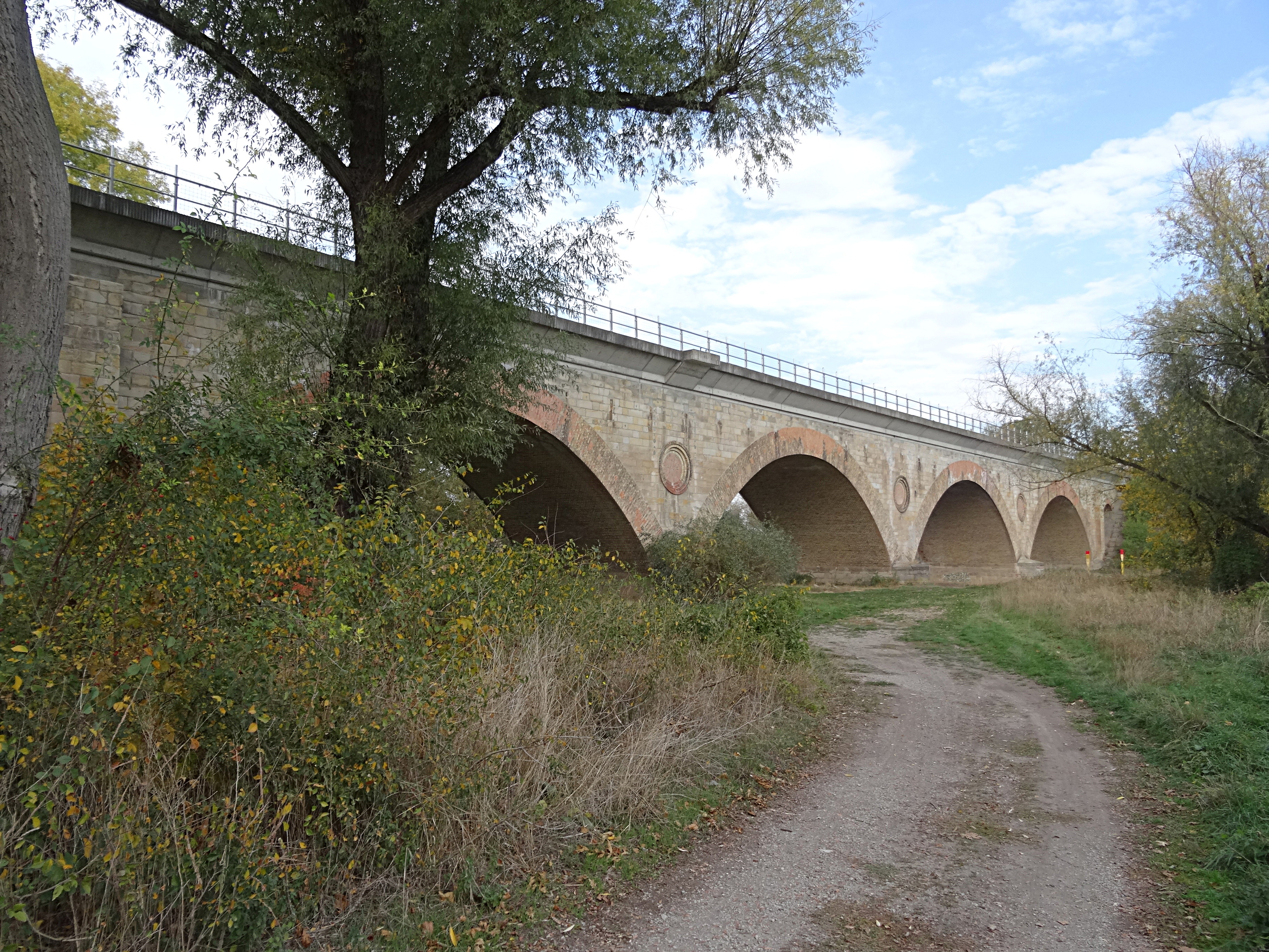 Brücke der Kanonenbahn über die Bode bei Hohenerxleben